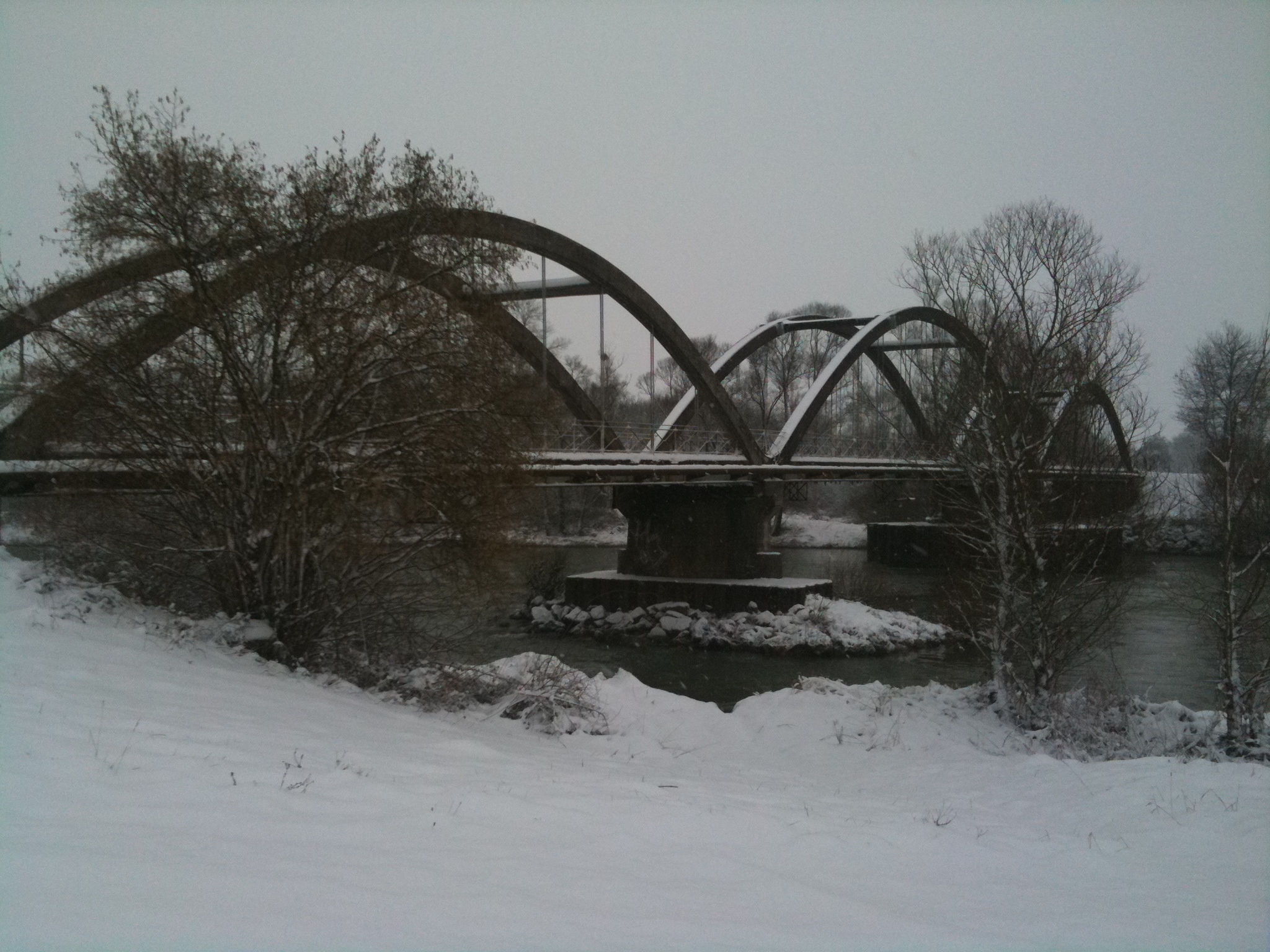 Prise de vue du pont de Belmont sous la neige en décembre 2010